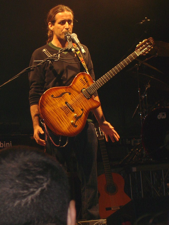 Daniele Silvestri in concerto (S. Salvo Marina, 11-8-07)